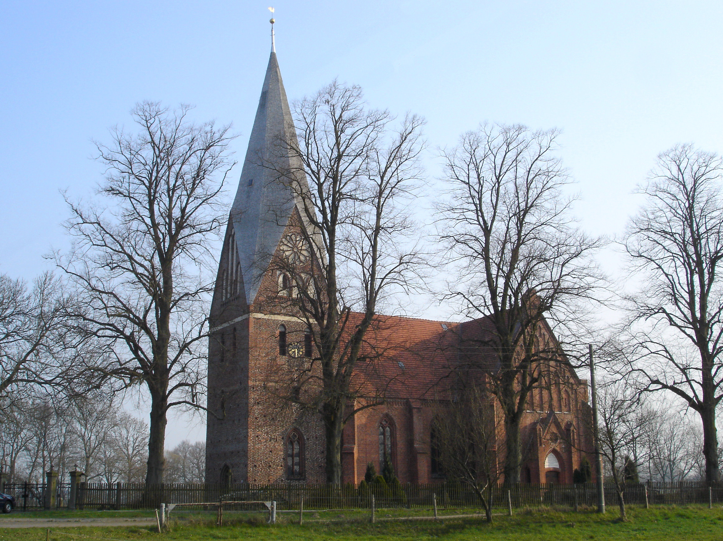 Kirche in Diedrichshagen Mecklenburg-Vorpommern / Church in Diedrichshagen Mecklenburg-Western Pomerania